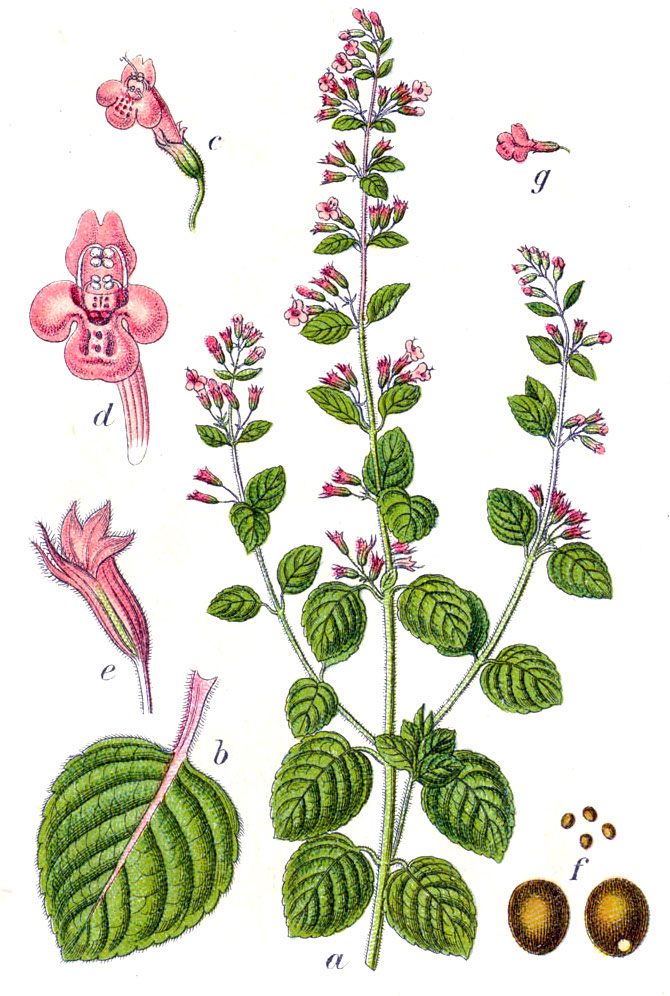 Clinopodium nepeta (L.) Kuntze, syn. Calamintha nepeta (L.) Savi, Thymus nepeta (L.) Sm. Original Caption Polei-Kalaminthe, Thymus nepeta